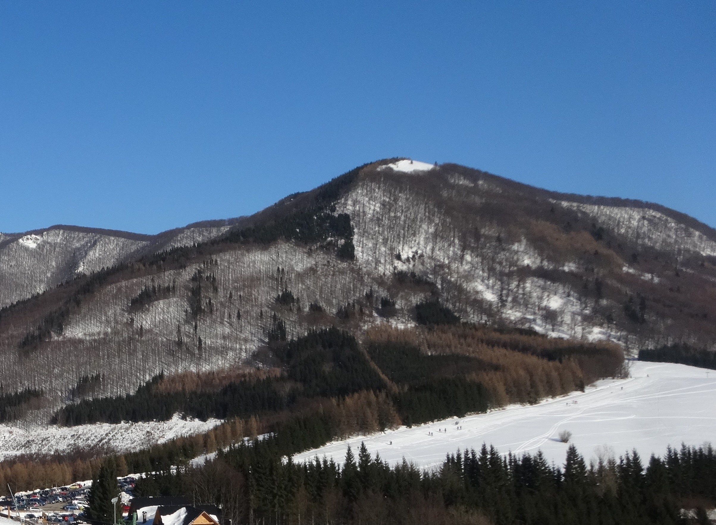 Reváň z Fačkovského sedla